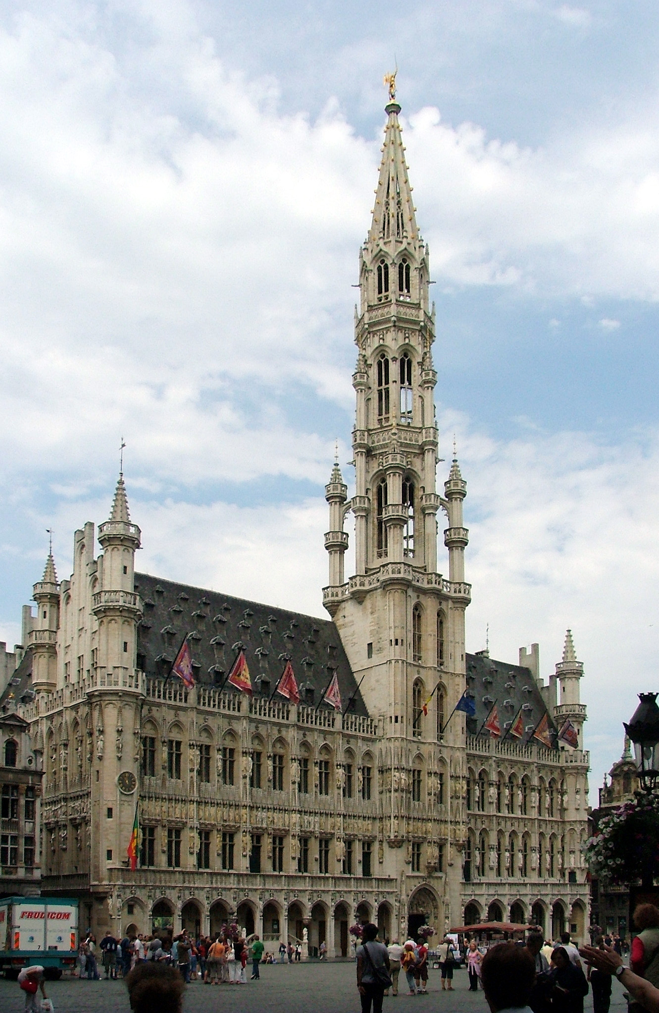 Belgium, Bruxelles - Brussel, Pl: Belgia, Bruksela